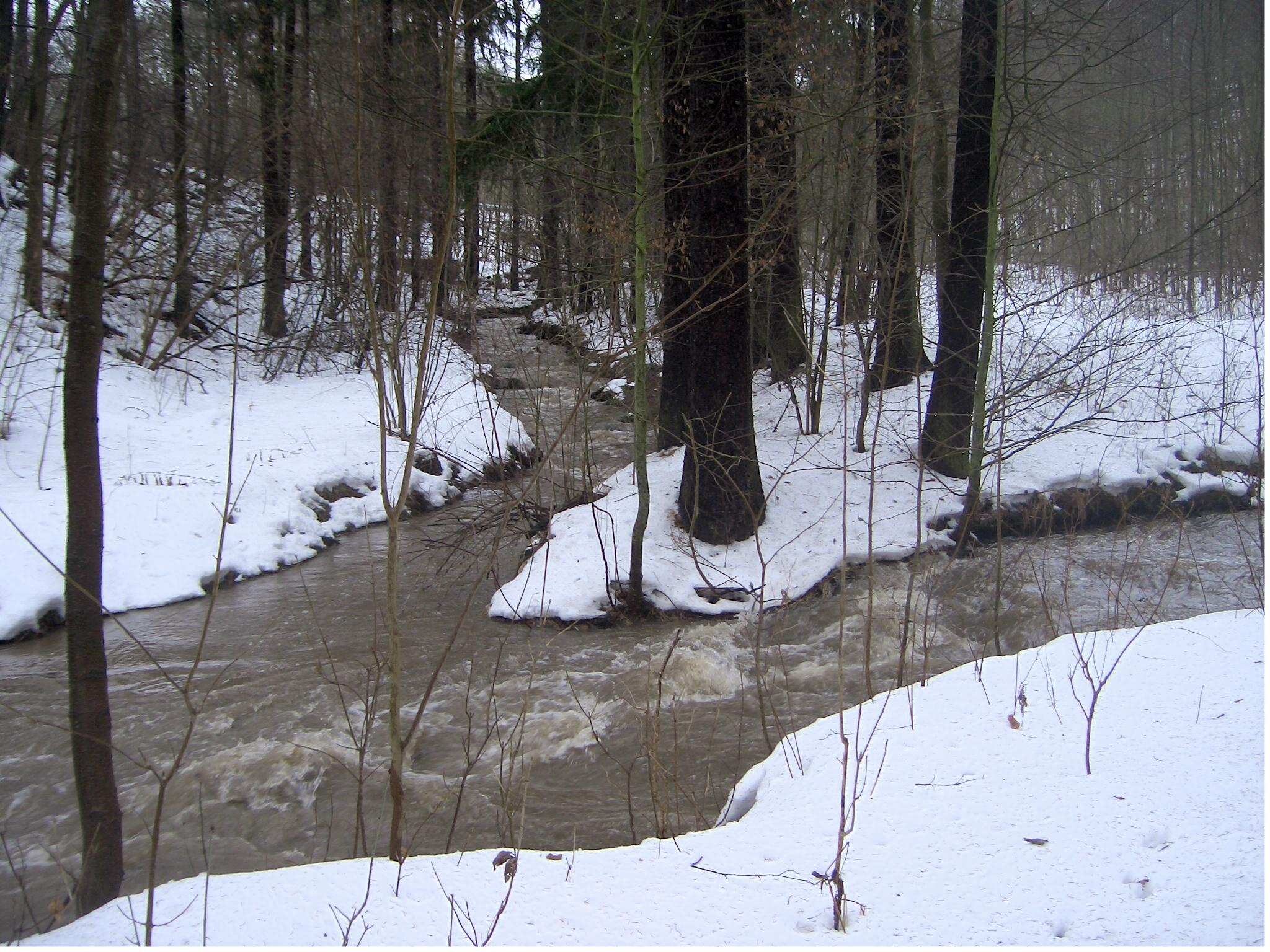 Vereinigung von Kemlitzbach aus Schlegel kommend (rechts) und Dittelsdorfer Dorfbach im Kemlitztal in der Senke unweit der B 99.